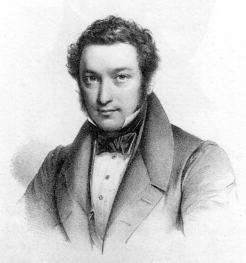 Anton von Schauß-Kempfenhausen (1800-1876), Abgeordneter der Paulskirche